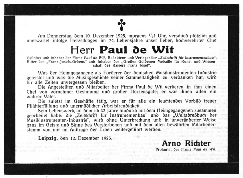 Todesanzeige für Paul de Wit in der Zeitschrift für Instrumentenbau